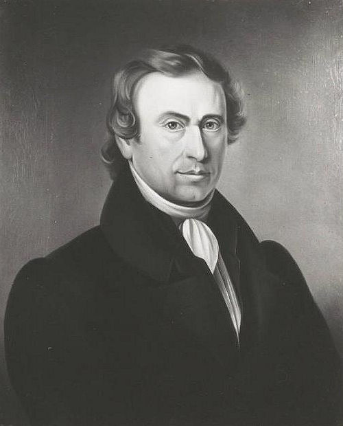 Afbeelding van Gerrit Kniphorst (1790-1850), burgemeester van Assen en Lid van de Tweede Kamer